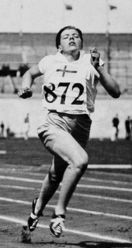 Sport. Olympische Spelen 1928 Amsterdam, Nederland. Atletiek. De Franse Georgette Gagneaux wint in 13.0 sec de 5e serie 100 meter hardlopen dames. M. Sundberg werd 2e.